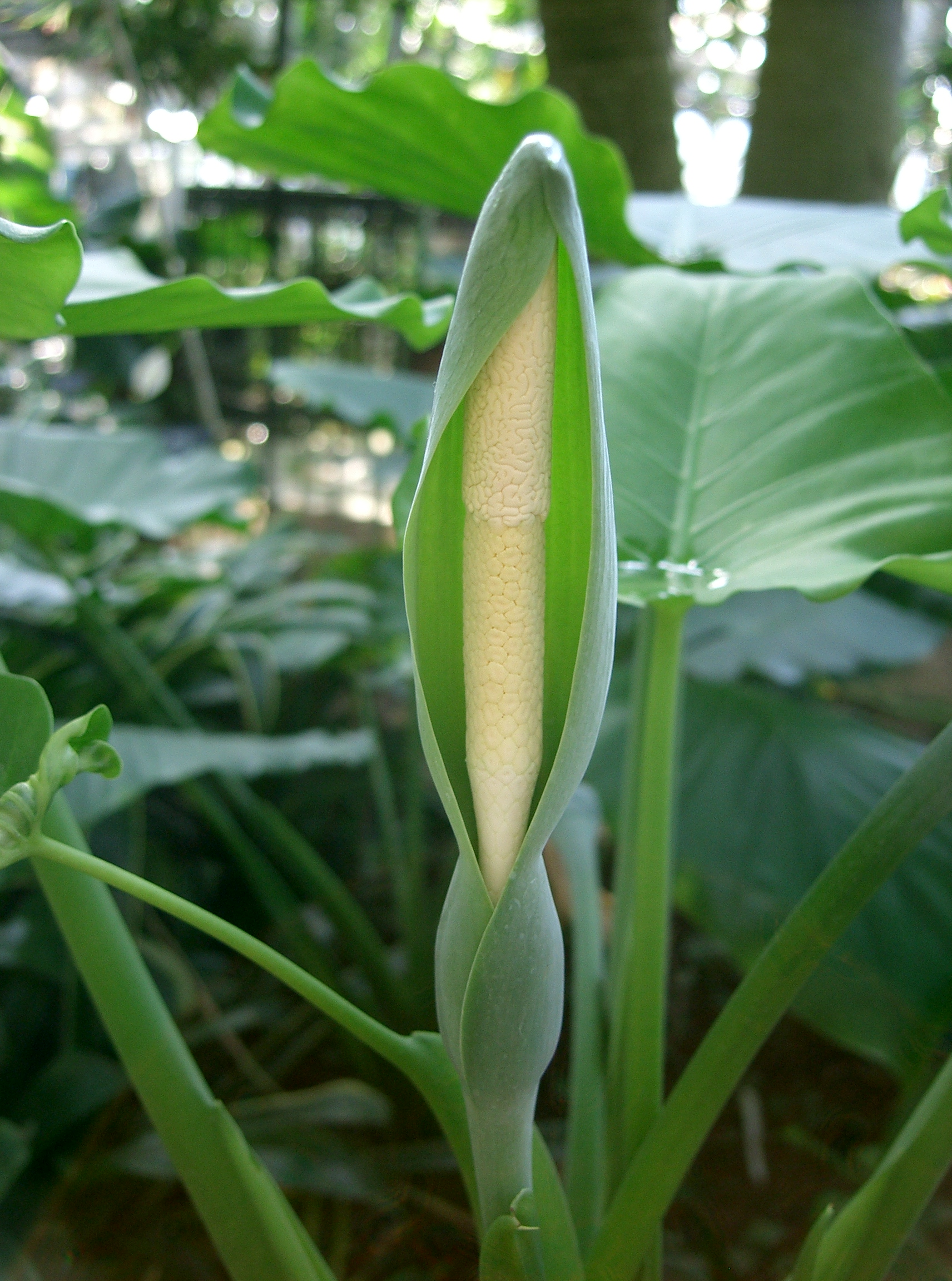 Scientific name Alocasia odora